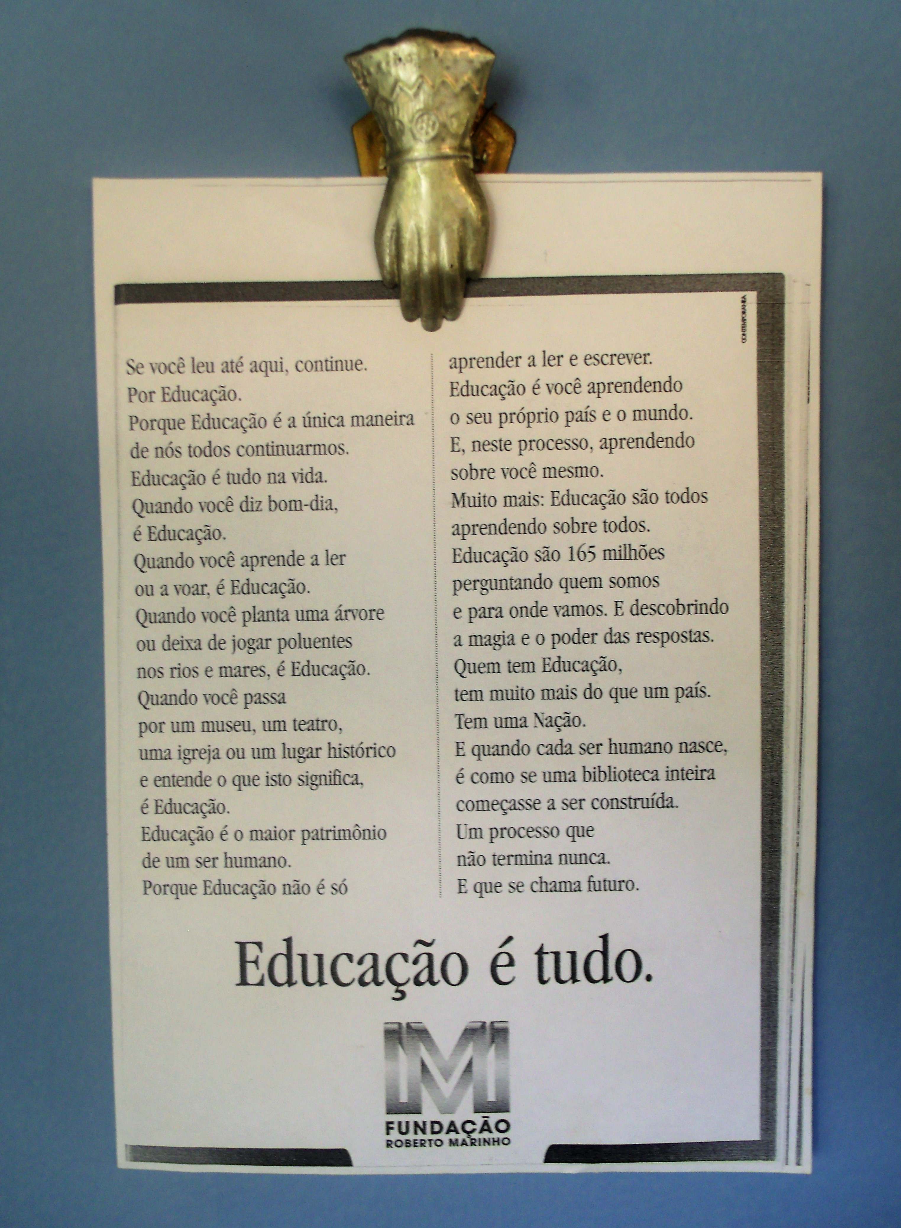 Cartaz da Fundação Roberto Marinho dos anos 1990s sobre educação.